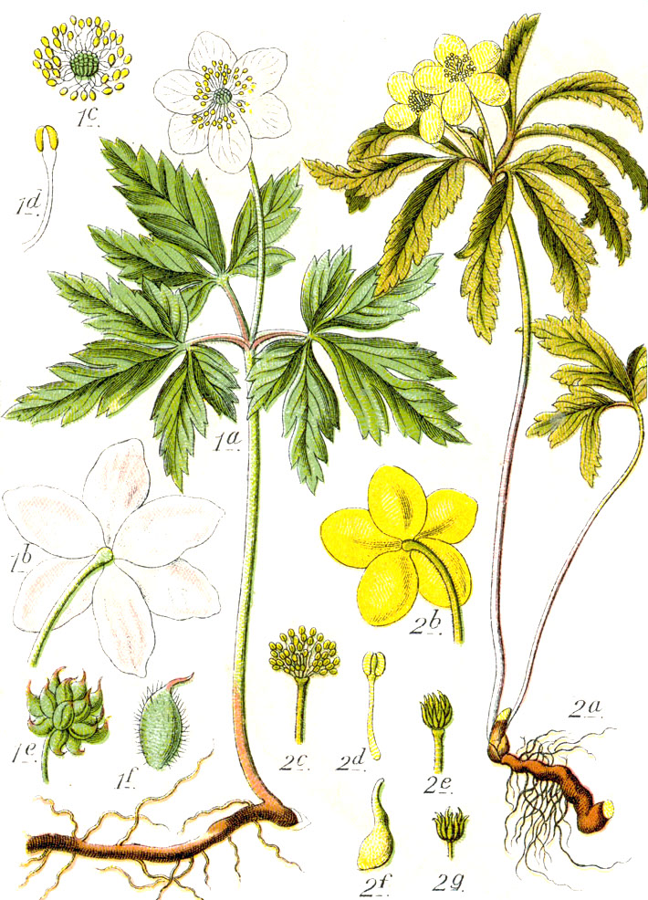 1: Anemone nemorosa L. 2: Anemone ranunculoides L. Original Caption 1. Weisse Anemone, Anemone nemorosa 2. Gelbe Anemone, A. ranunculoides